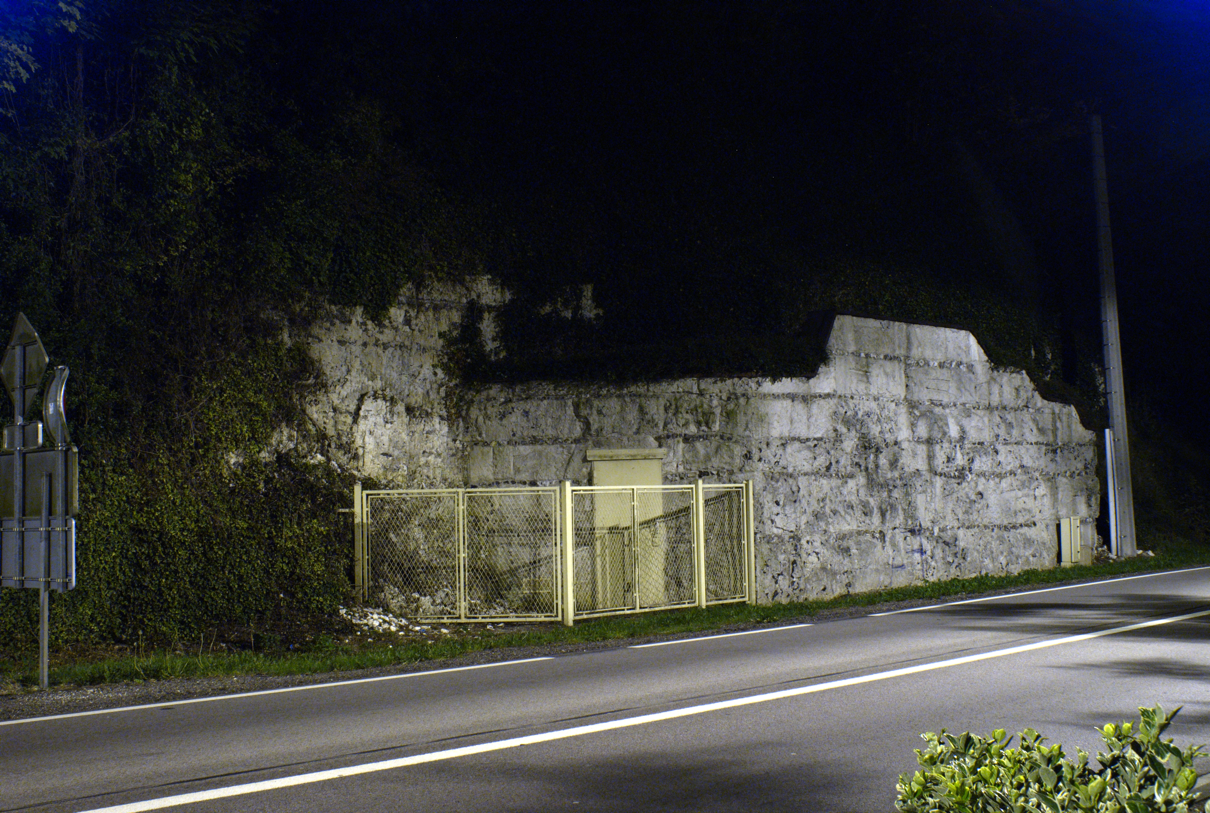 Entrée de la grotte de Gouy sur la RN15